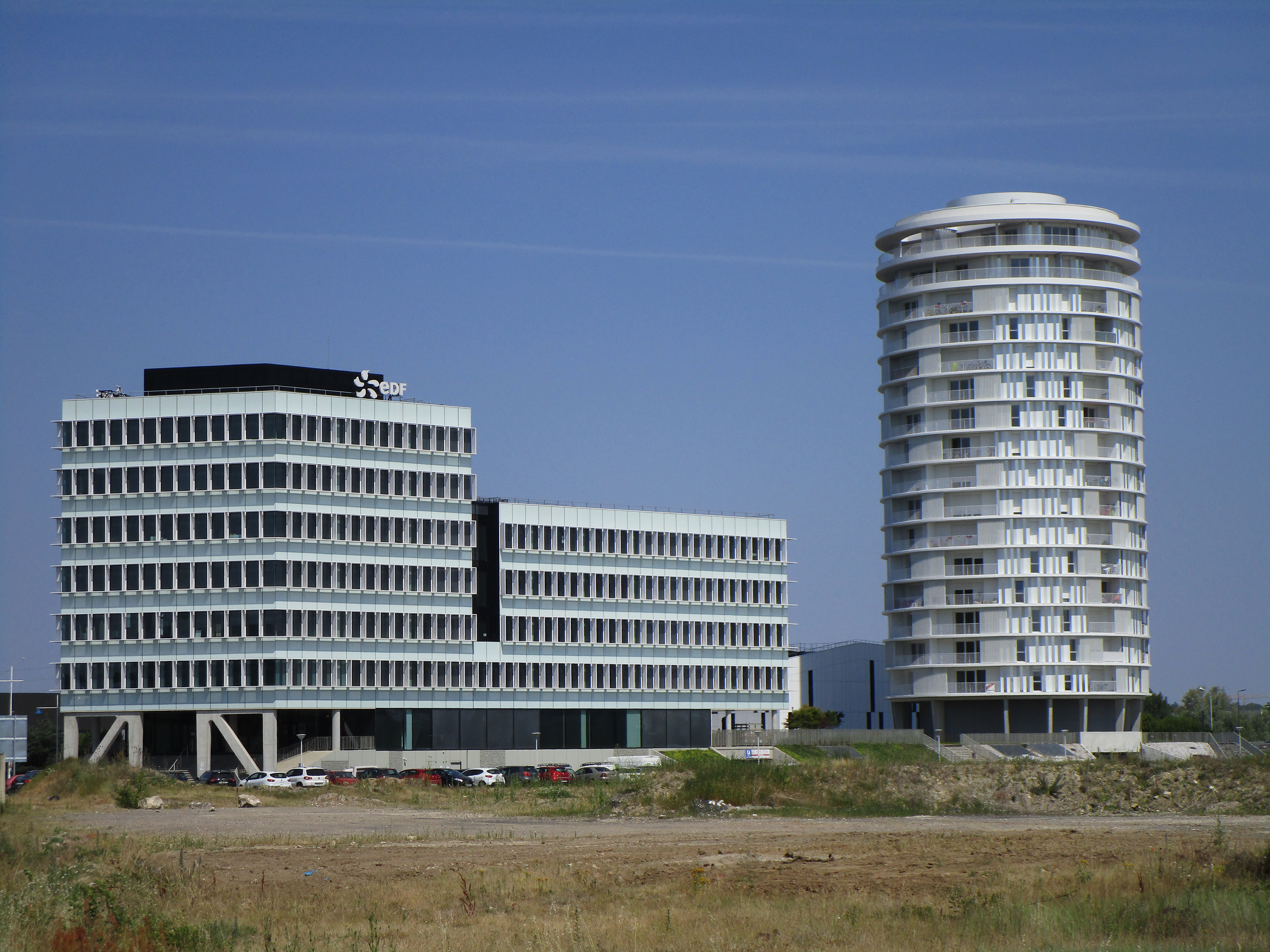 Vue de la Tour lumière à droite et des bâtiments administratifs d'EDF à gauche dans le quartier des Deux-Lions à Tours.